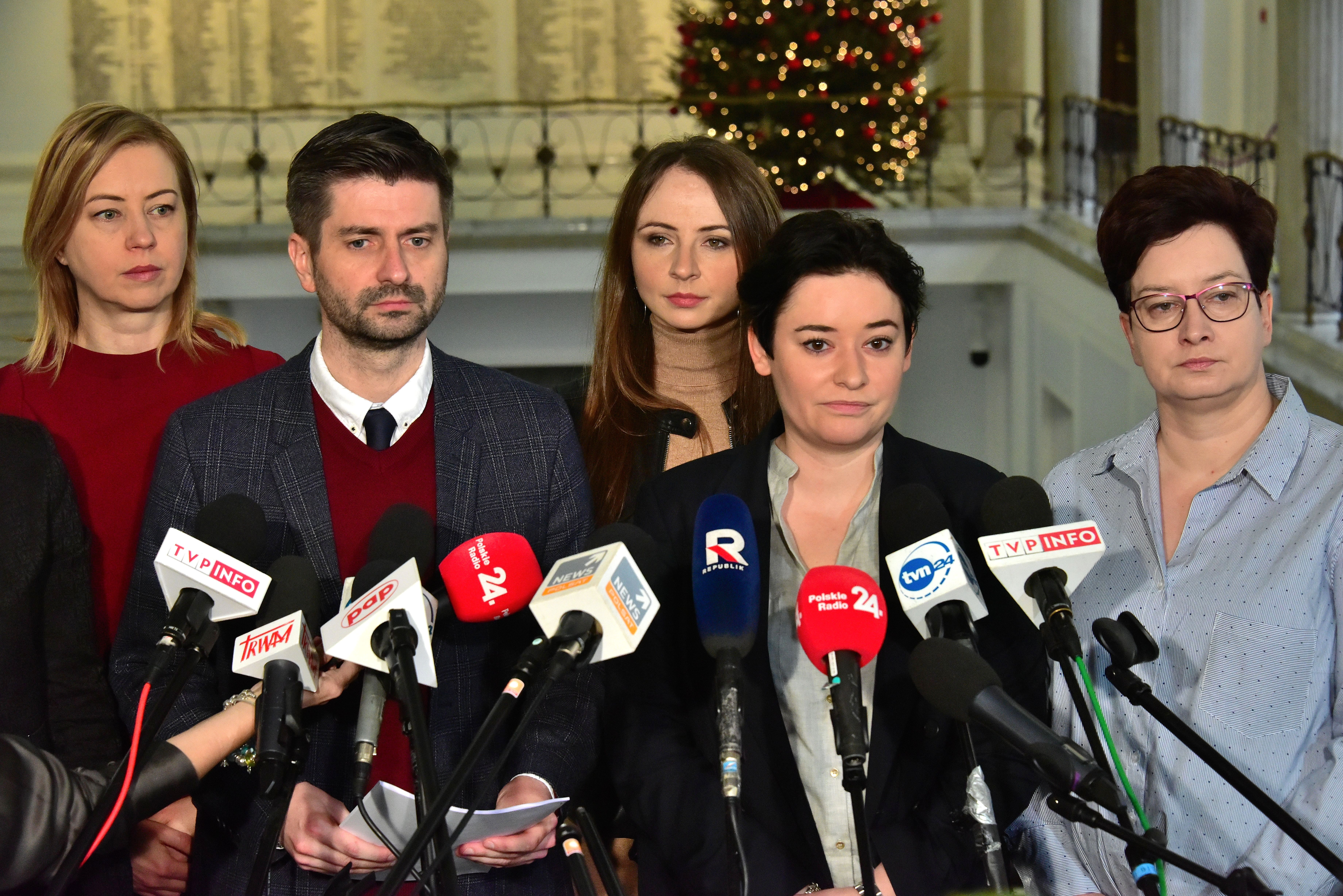 Posłowie (od lewej):Hanna Gill-Piątek, Krzysztof Śmiszek, Agnieszka Dziemianowicz-Bąk, Anna Żukowska i Monika Falej w Sejmie